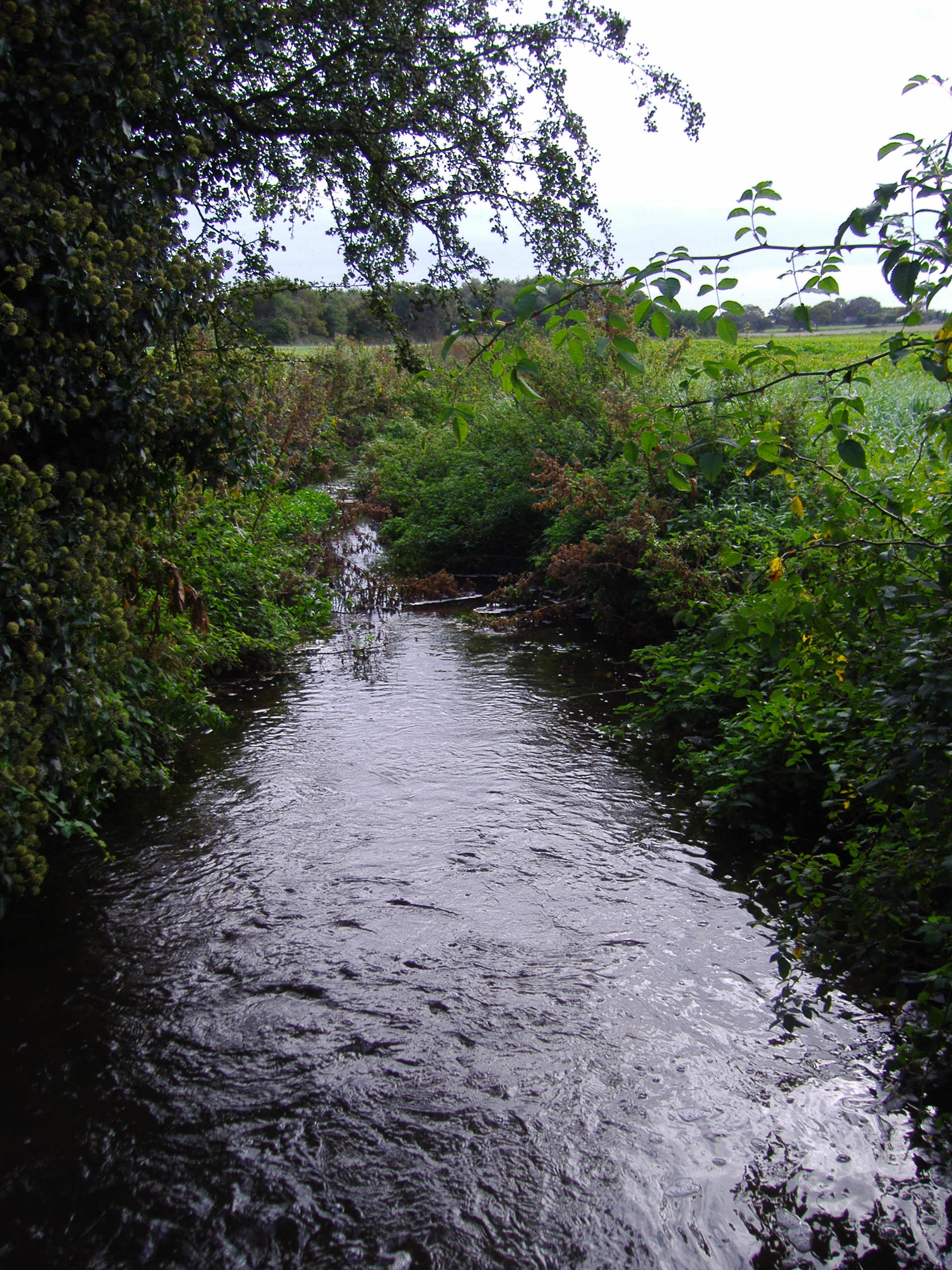 River Mun near Mundesley Hospital, Norfolk